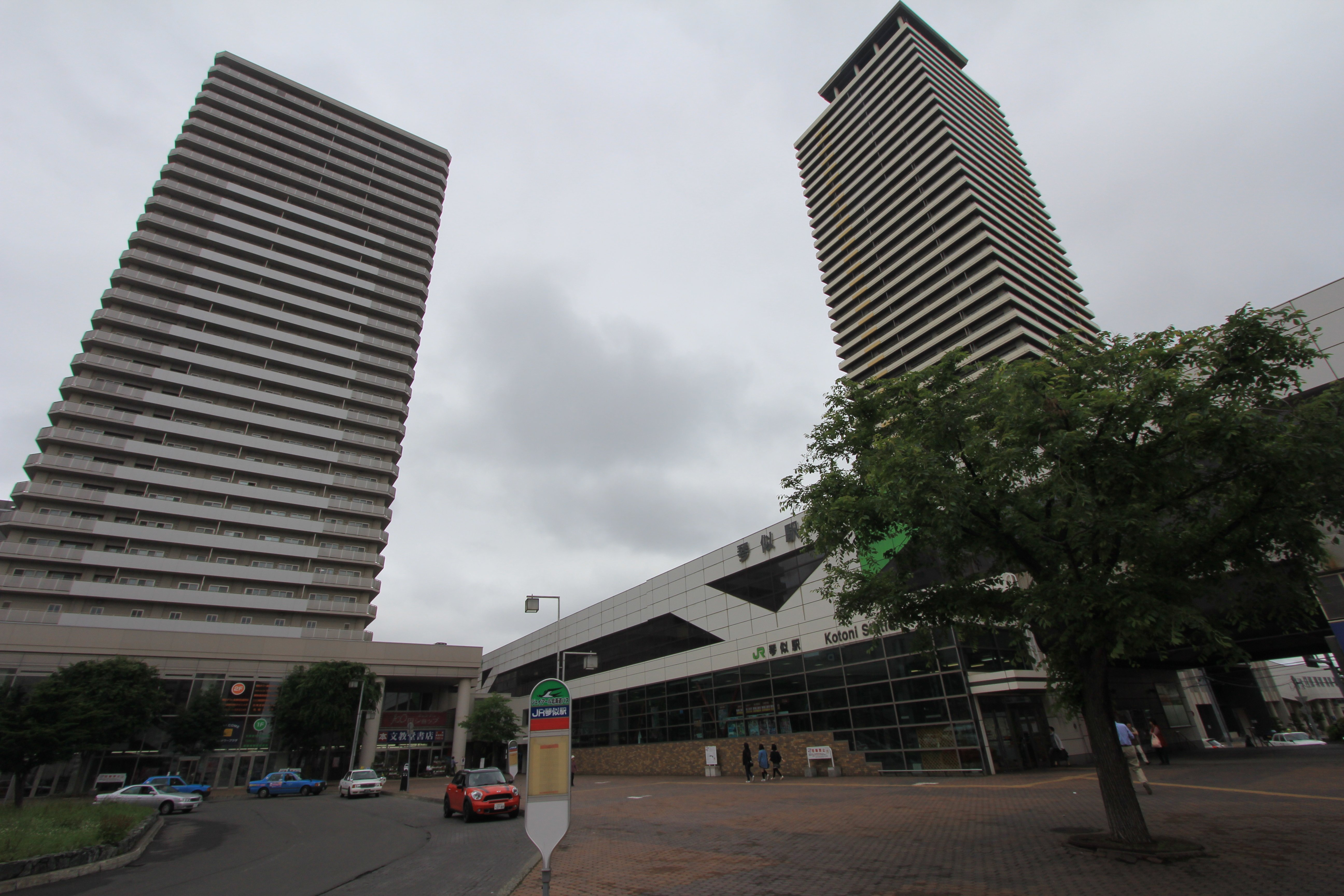 JR琴似駅